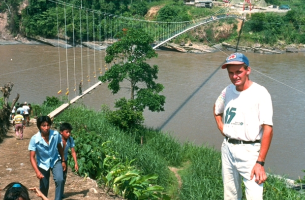 Toni Rüttimann di fronte al ponte sul rio Aguarico di 264 metri, costruito dalla popolazione locale ecuadorena